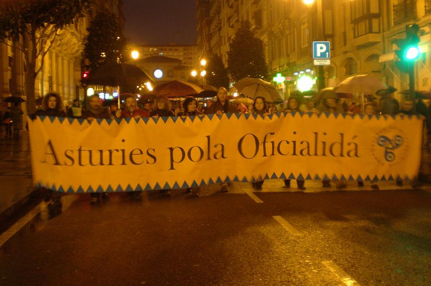 Cabecera mani pola oficialida